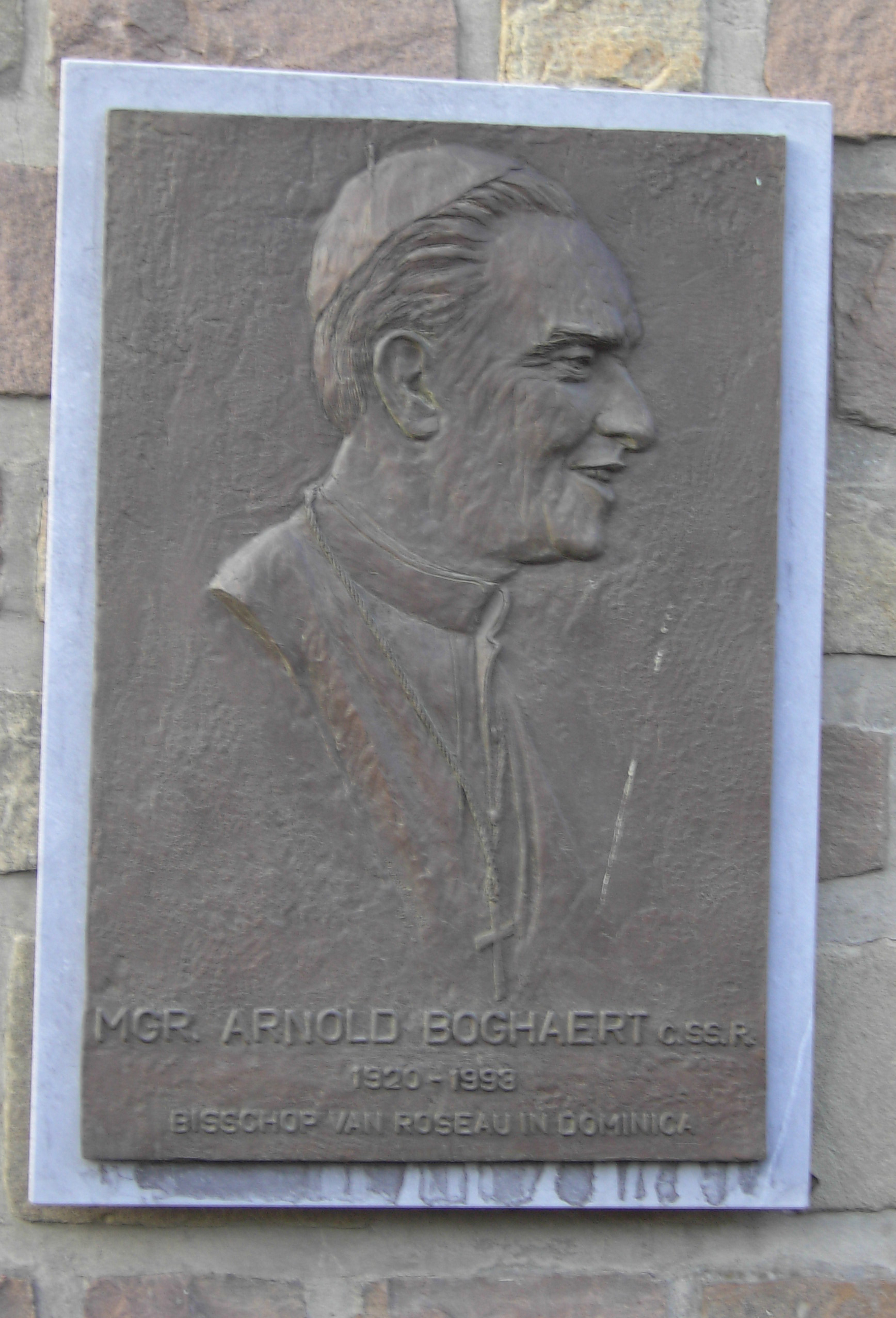 Arnold Boghaert (°Landegem - Belgium) was bisschop op het eiland Dominica in Roseau.